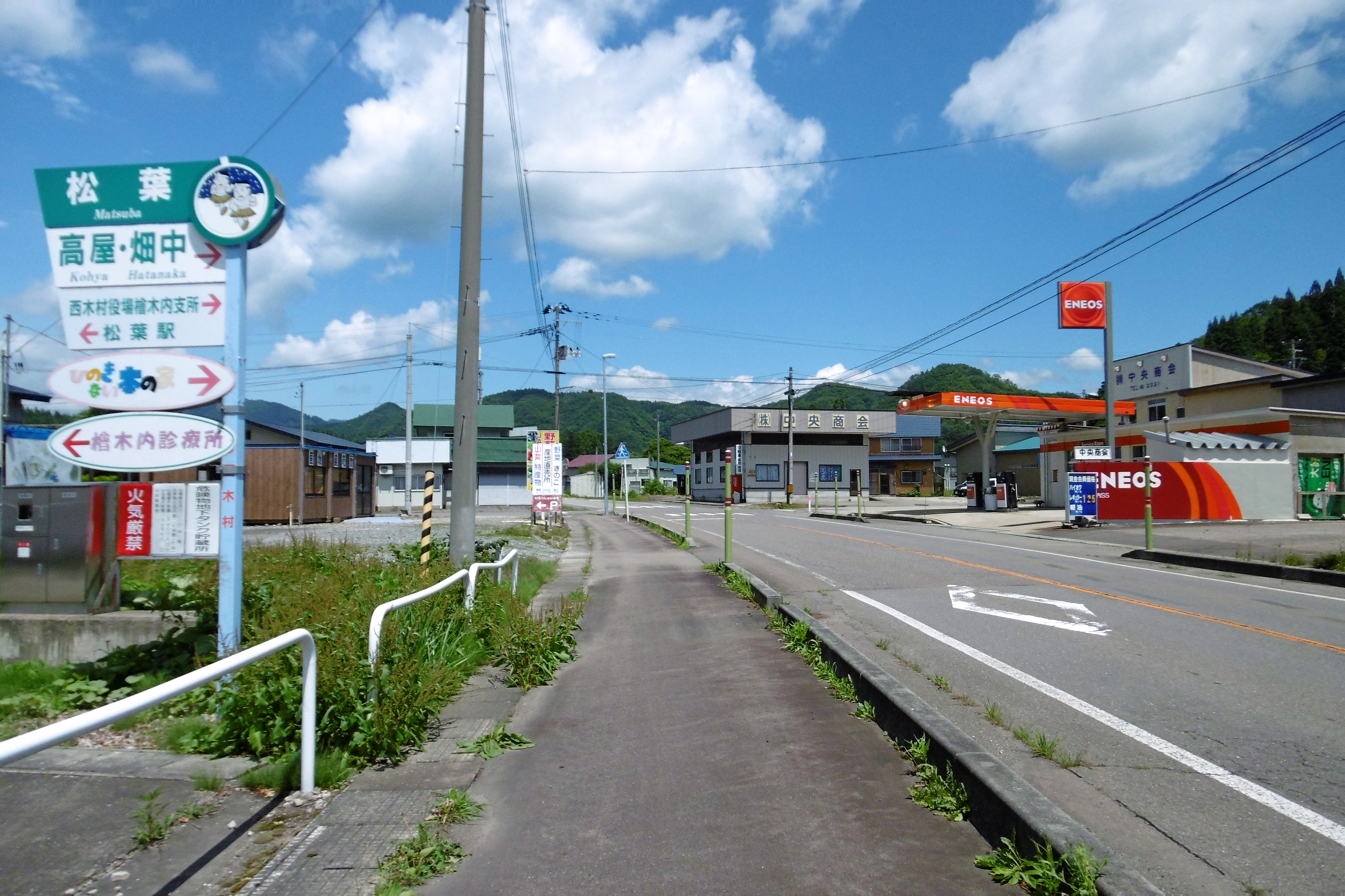 国道105号 松葉駅付近：秋田県仙北市西木町